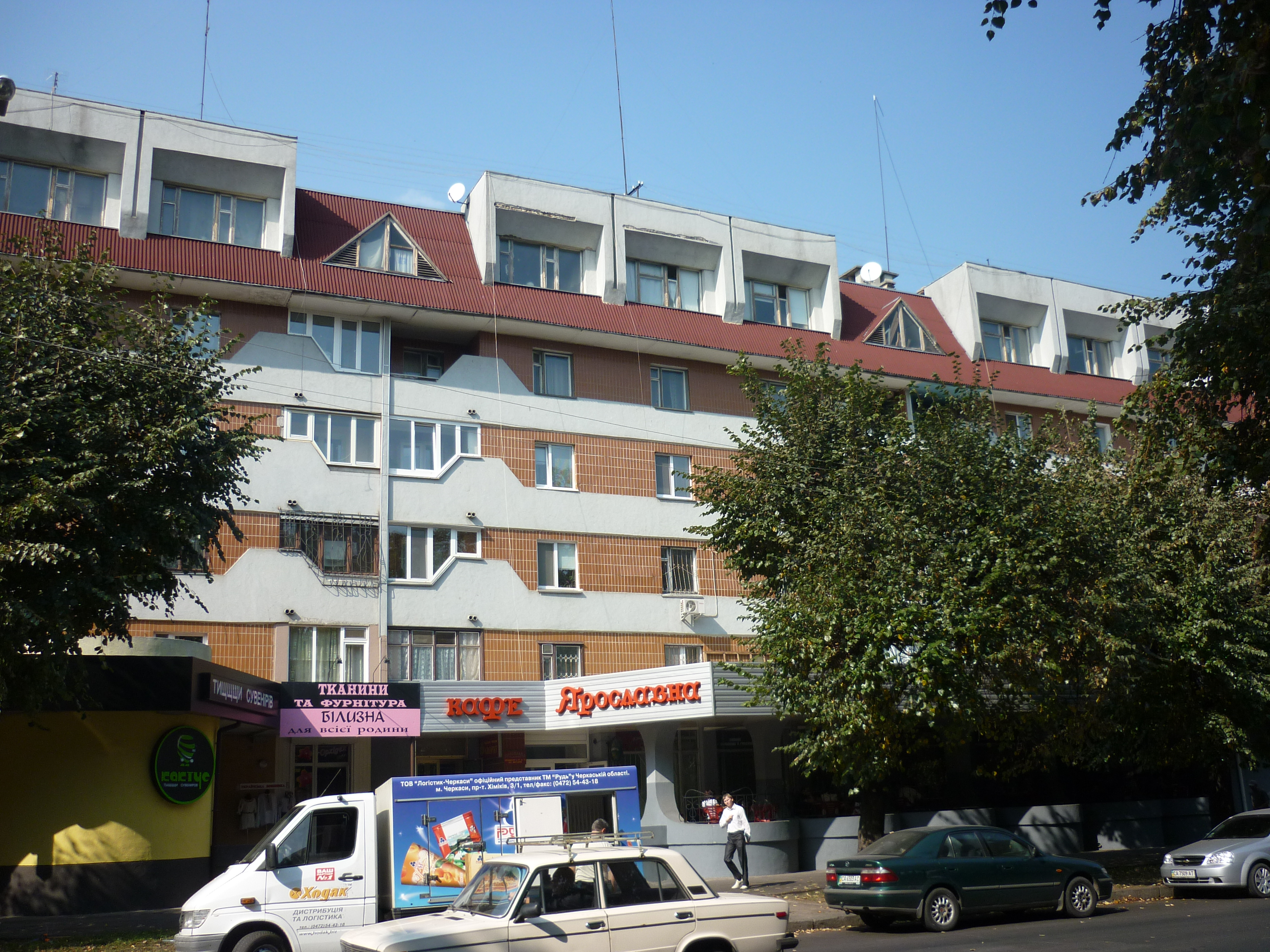 будинок по вулиці Б.Вишневецького 22